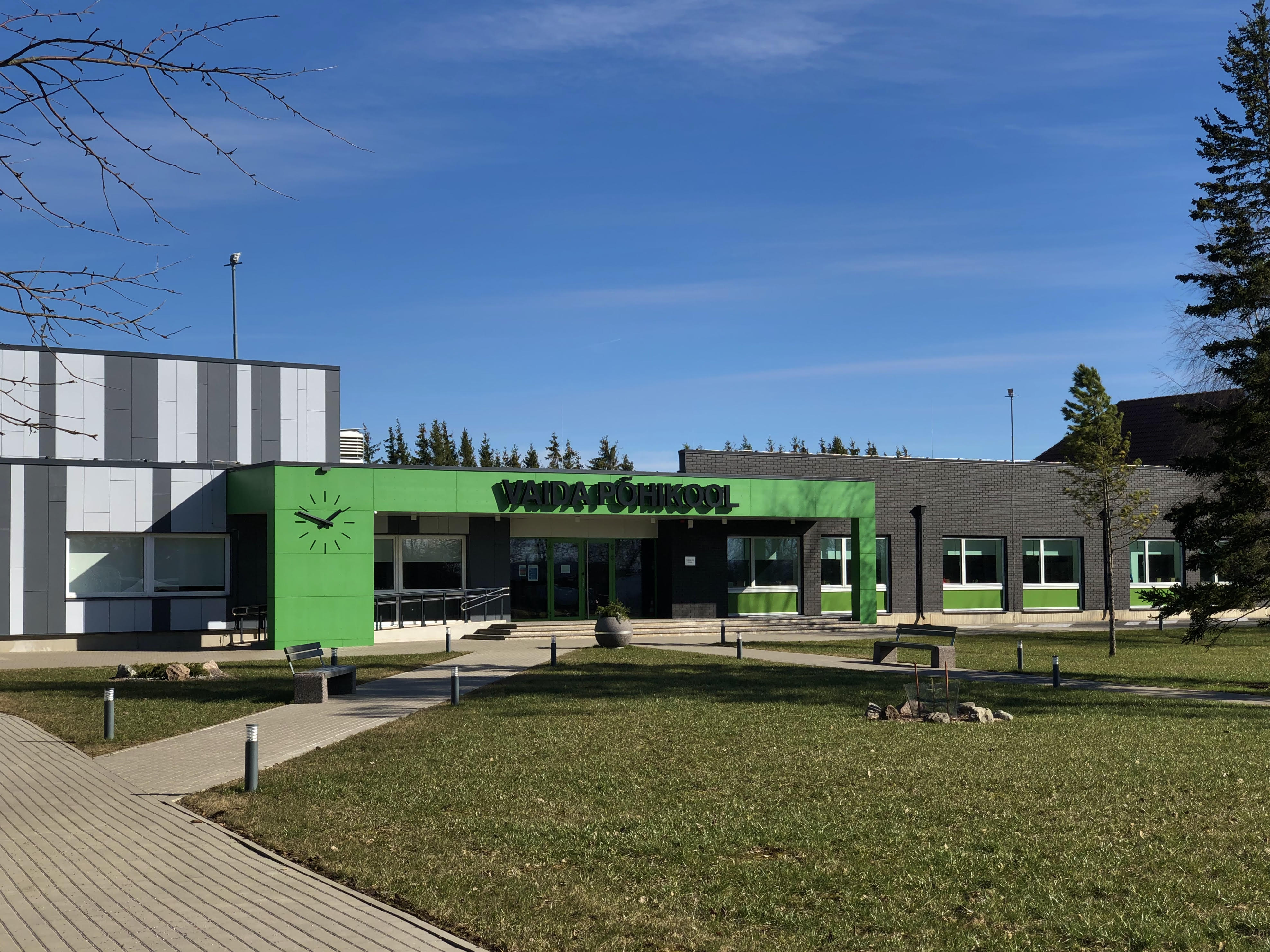 Vaida Põhikooli hoone